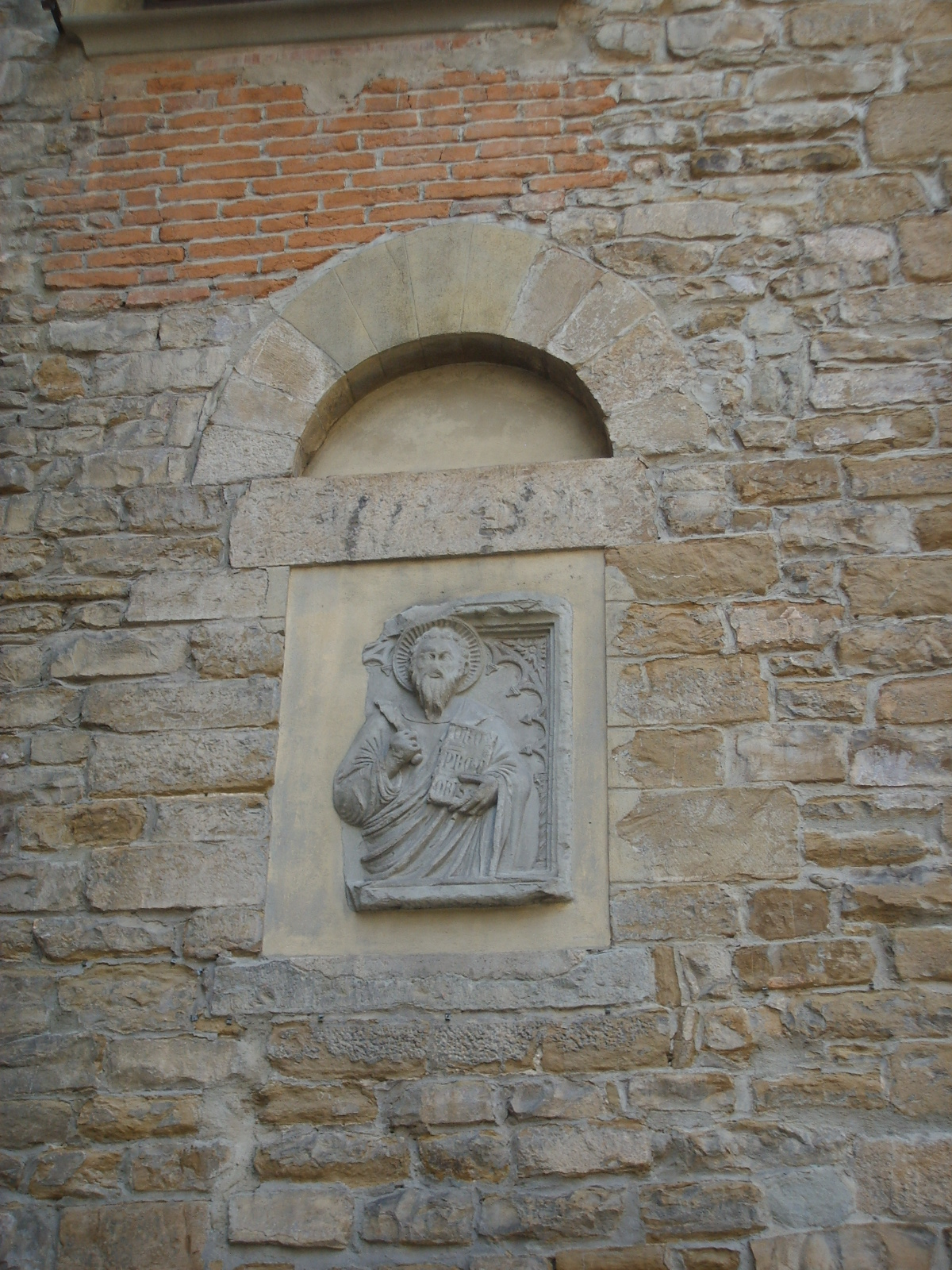 Torre dei peruzzi, bassorilievo san bartolomeo